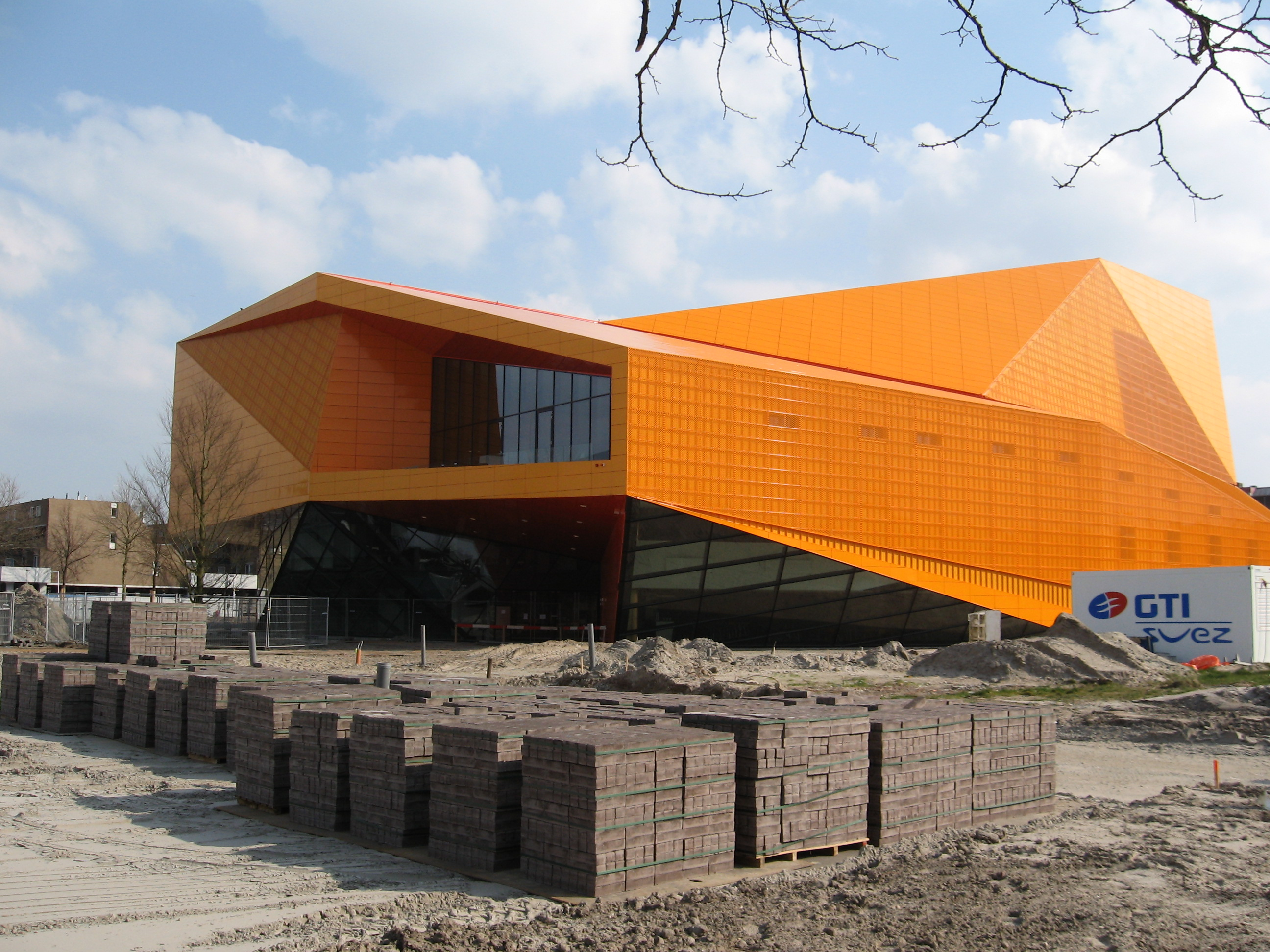 Het exterieur